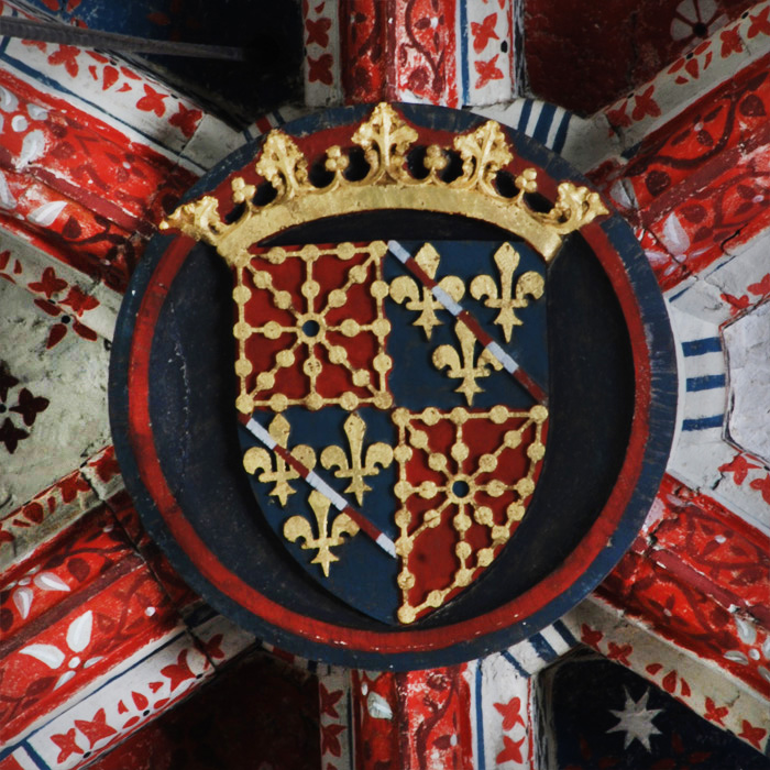 Escudo de Carlos III de Navarra en la catedral de Pamplona.